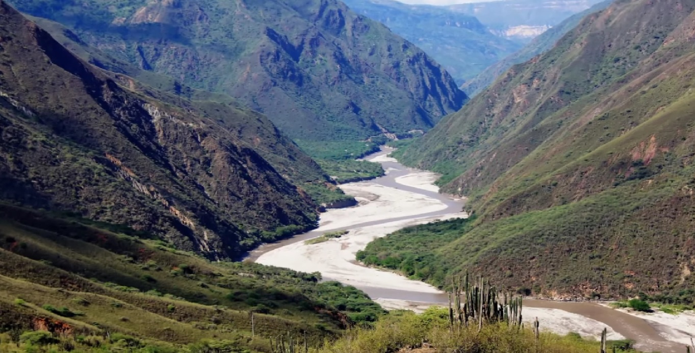 Cañon del Chicamocha Capitanejo